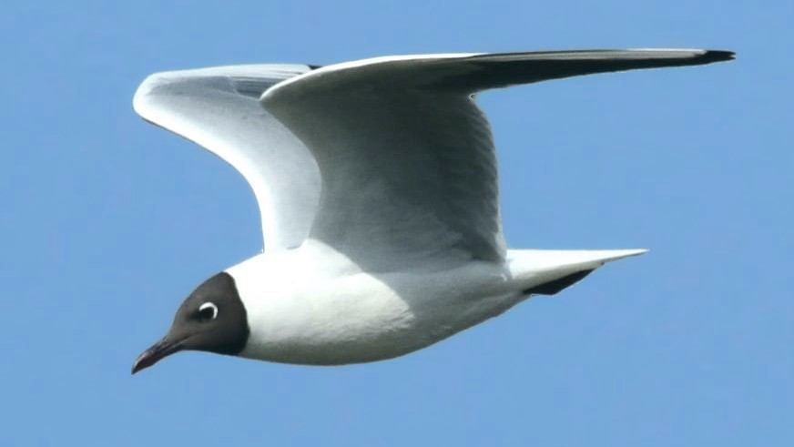 Озёрная чайка, или обыкновенная (речная) чайка (Larus ridibundus) над рекой Малый Койсуг в Ростовской области.